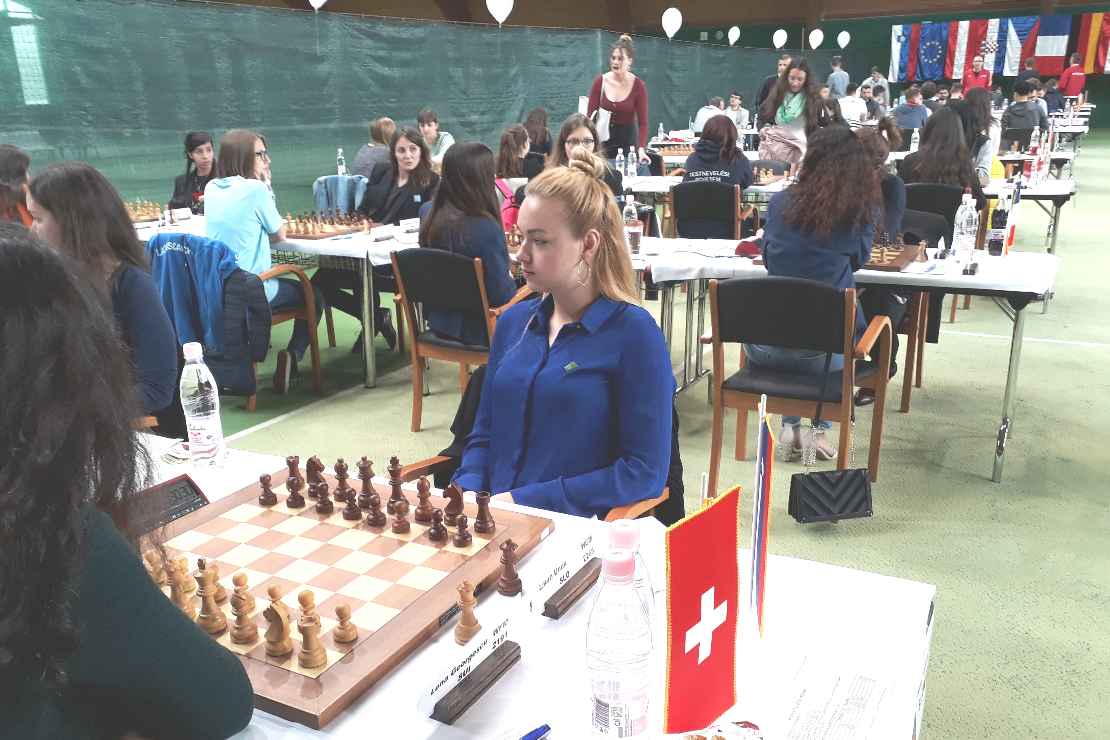 Turniersaal, Runde 4 Mitropa Cup 2019 in Radenci (Slowenien).